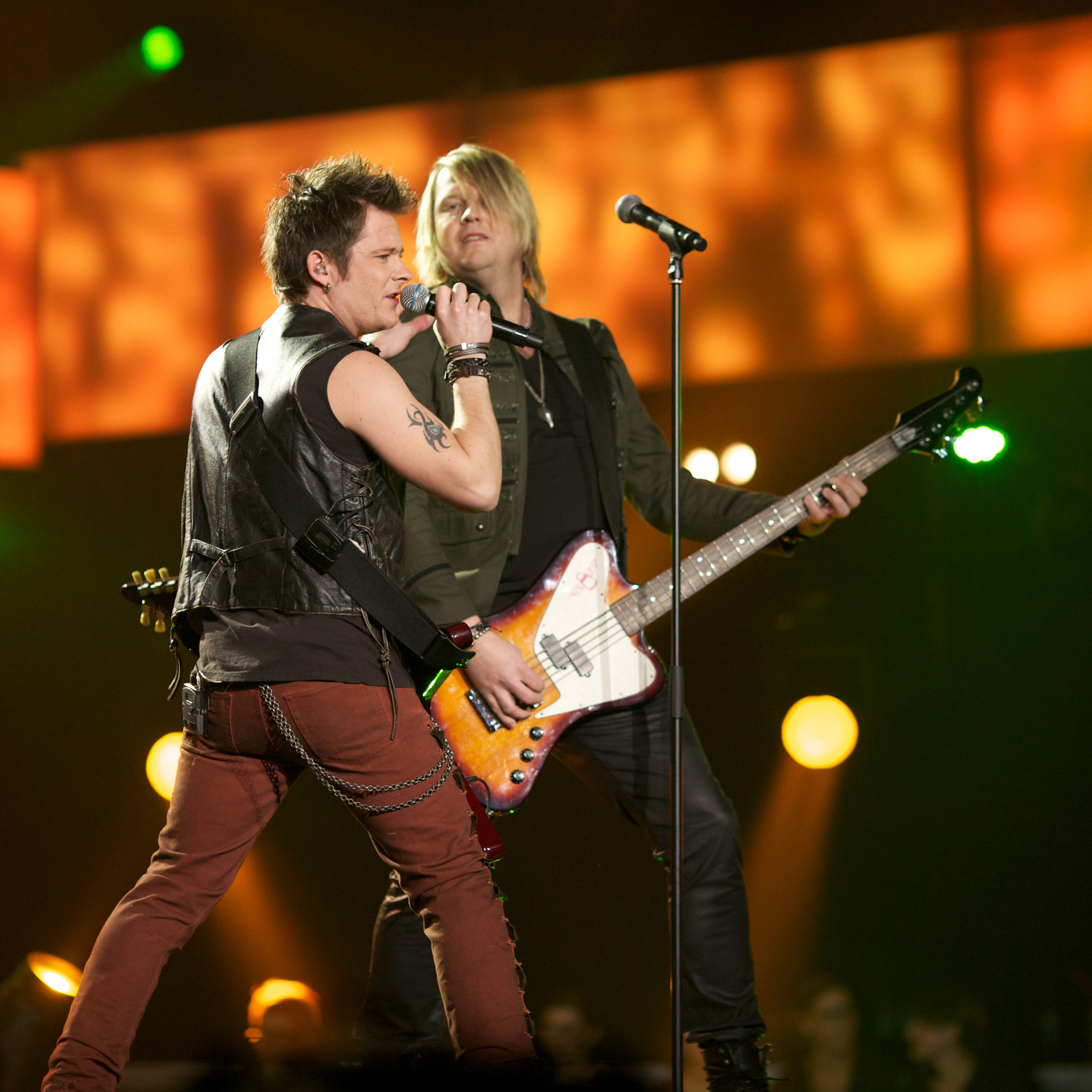 MPG 2012 delfinale i Larvik